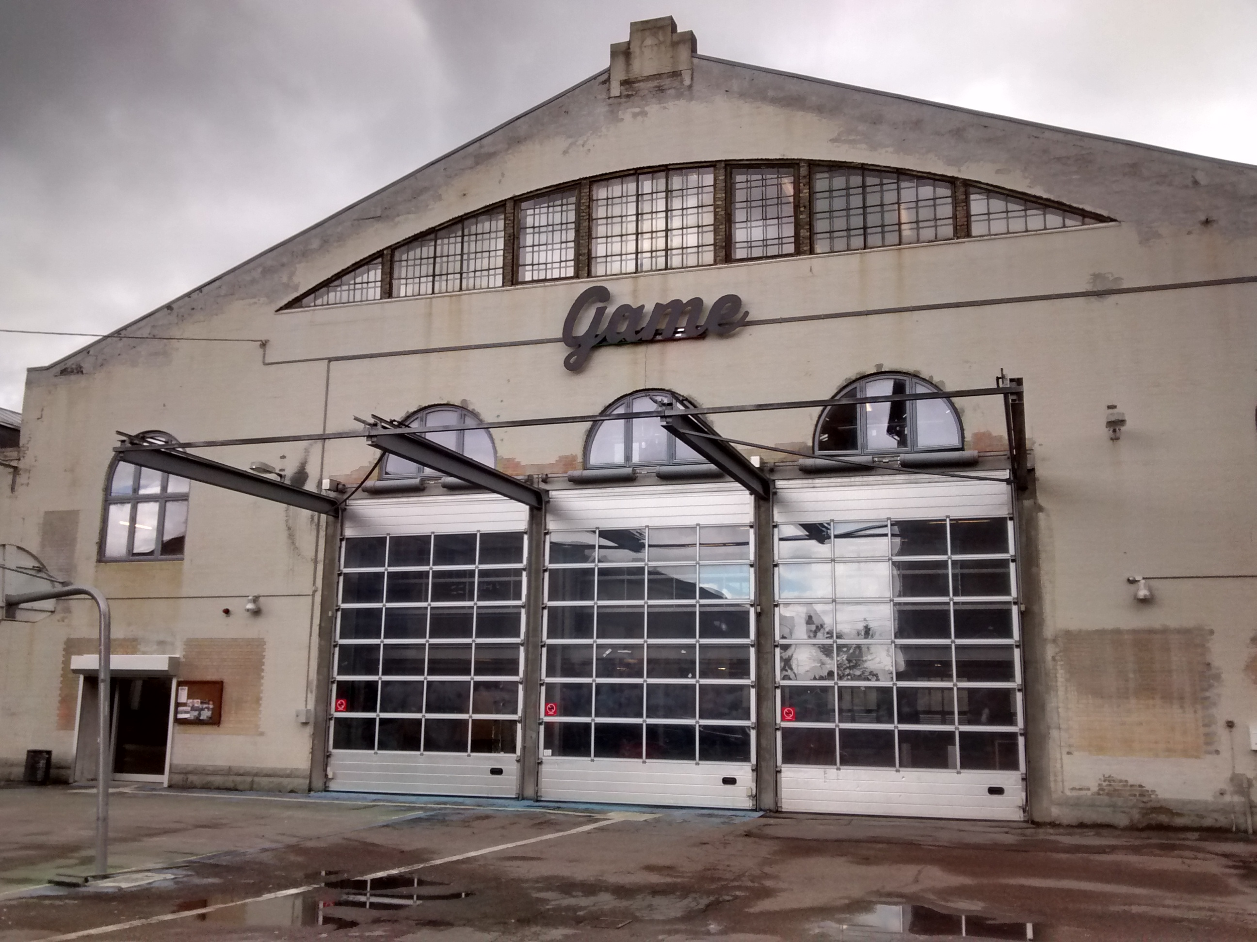 StreetMekka in Copenhagen.